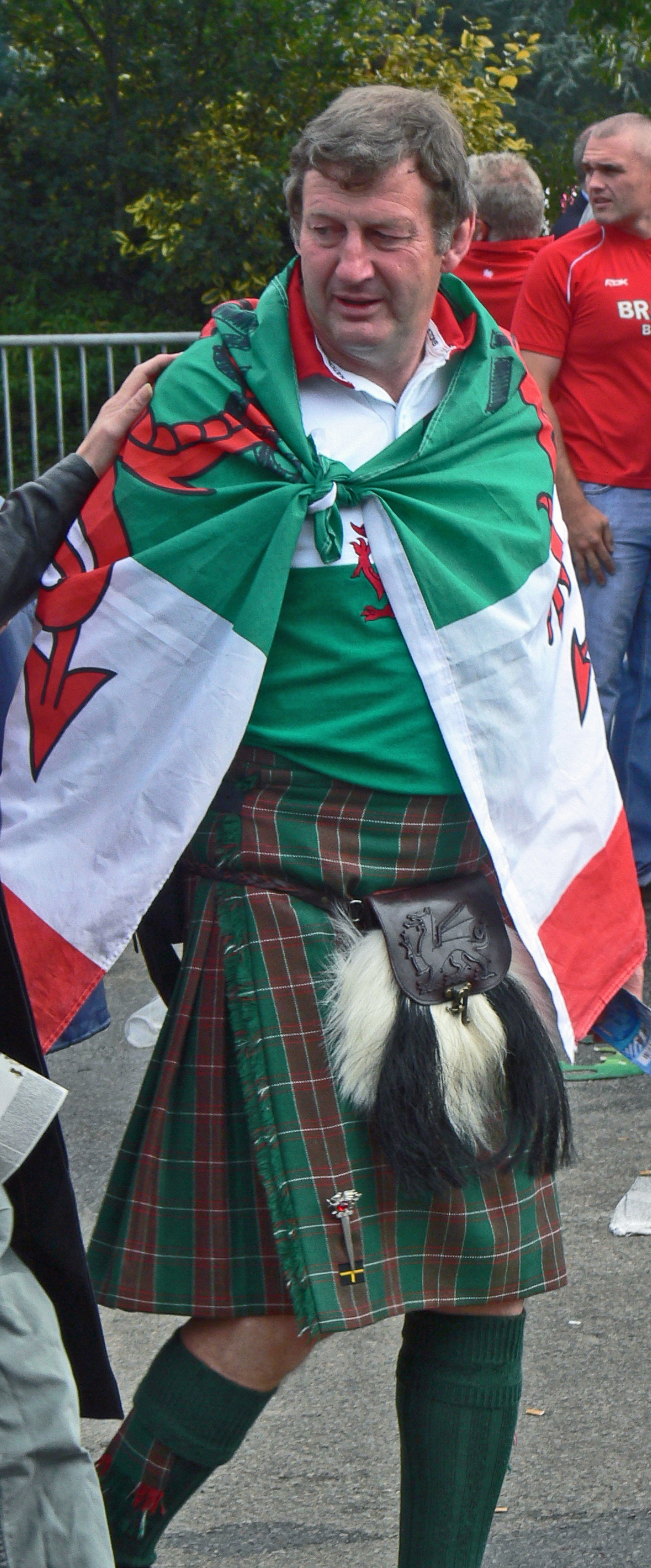 Supporter gallois / Wales fan. 9 sept - Wales vs Canada